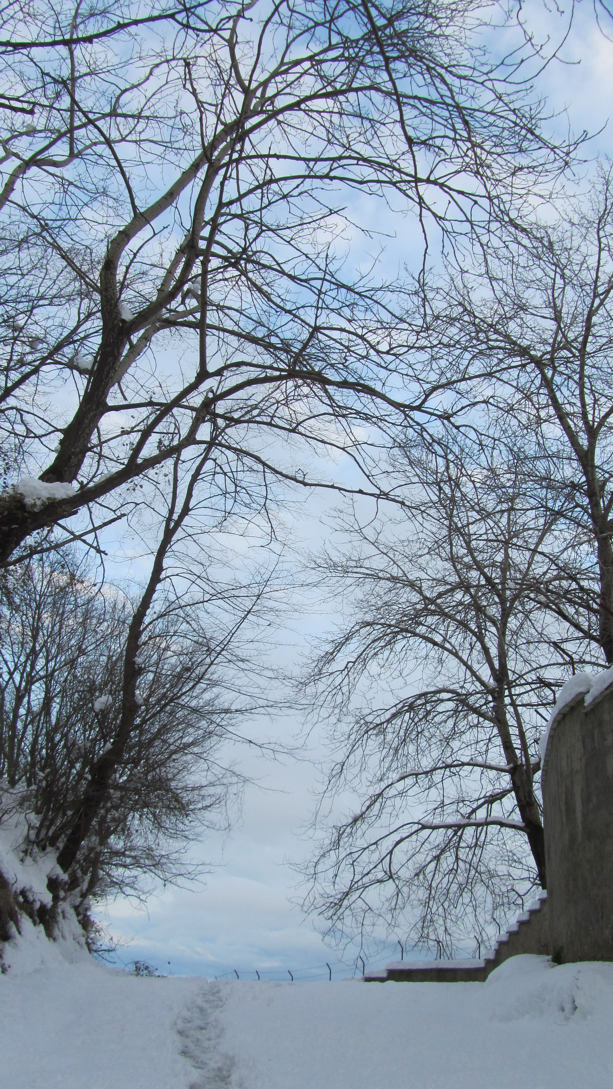 برف زیبا